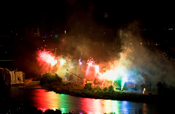 Fuegos artificiales durante la ceremonia de clausura de la Exposición Internacional Zaragoza 2008.